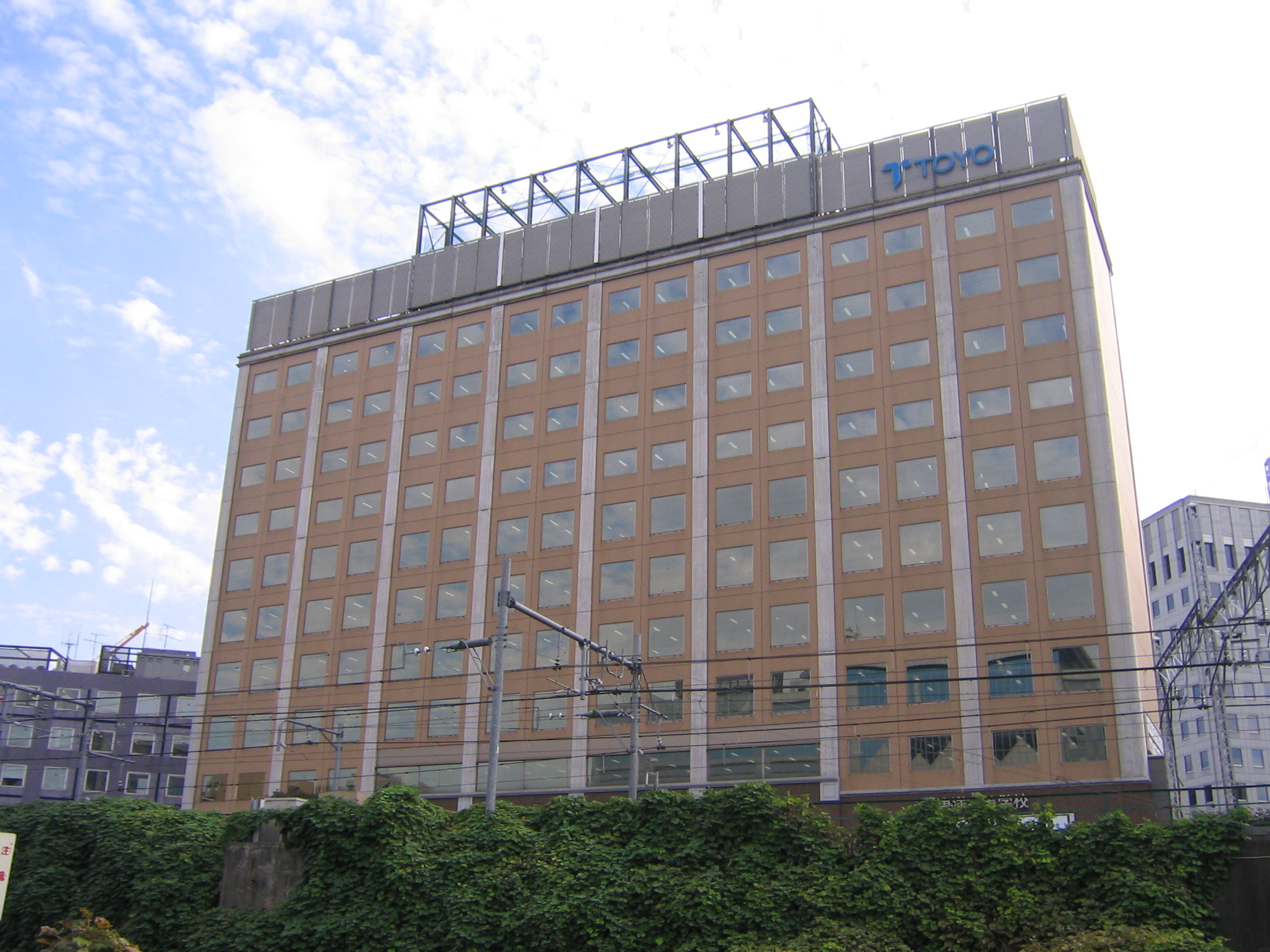 東洋高等学校